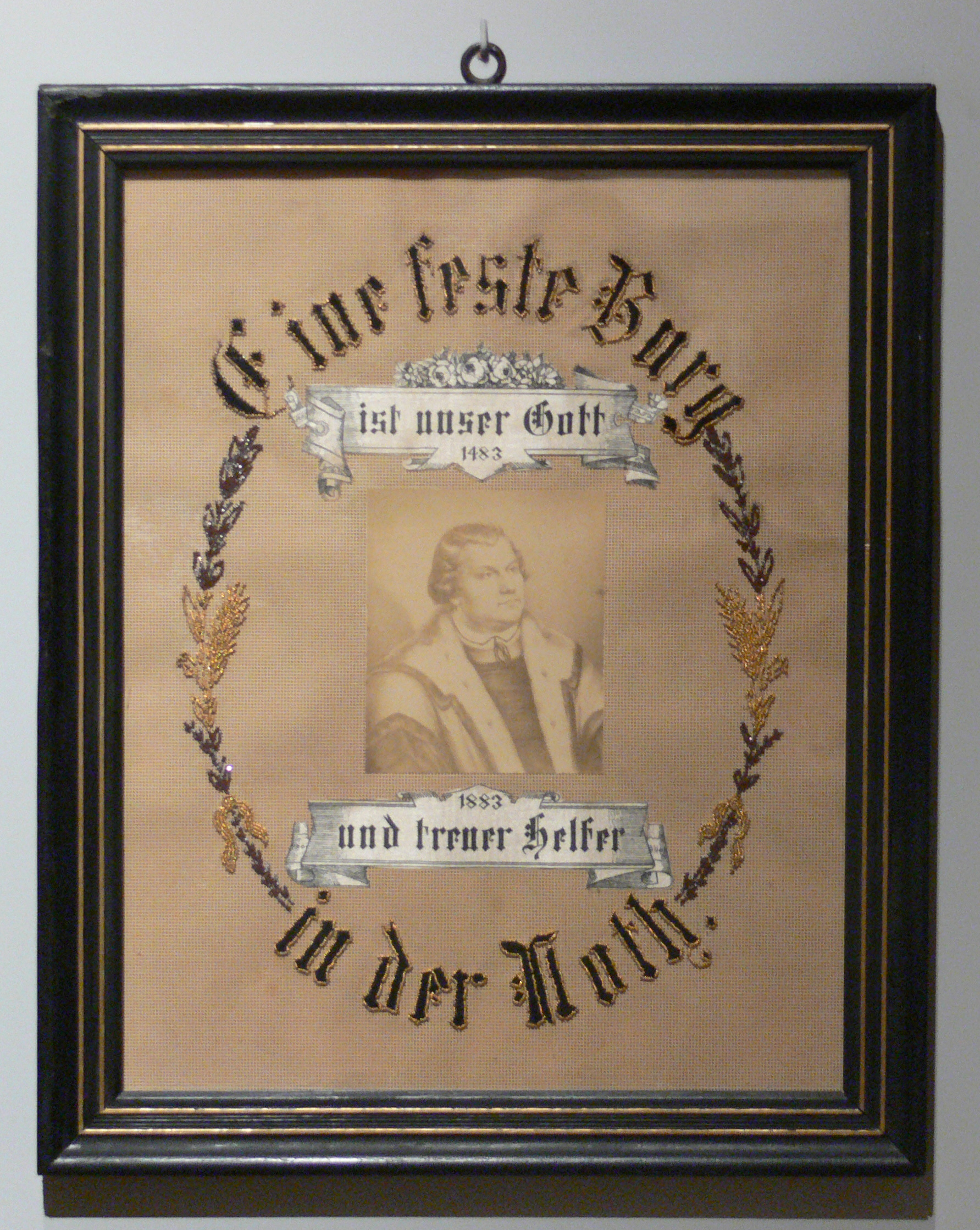 Spruchbild Ein feste Burg ist unser Gott, 1883 Landesmuseum Württemberg (Außenstelle Museum für Volkskultur in Württemberg, Waldenbuch)